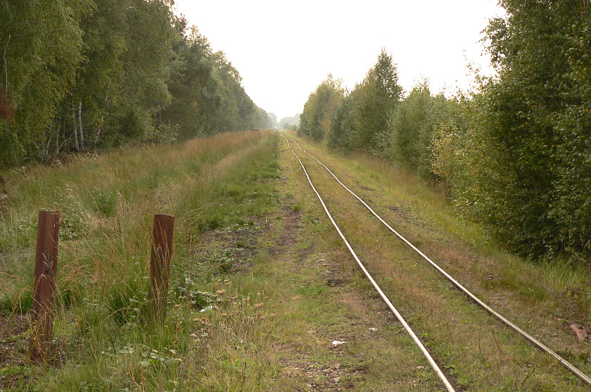 Totes Moor Gleise